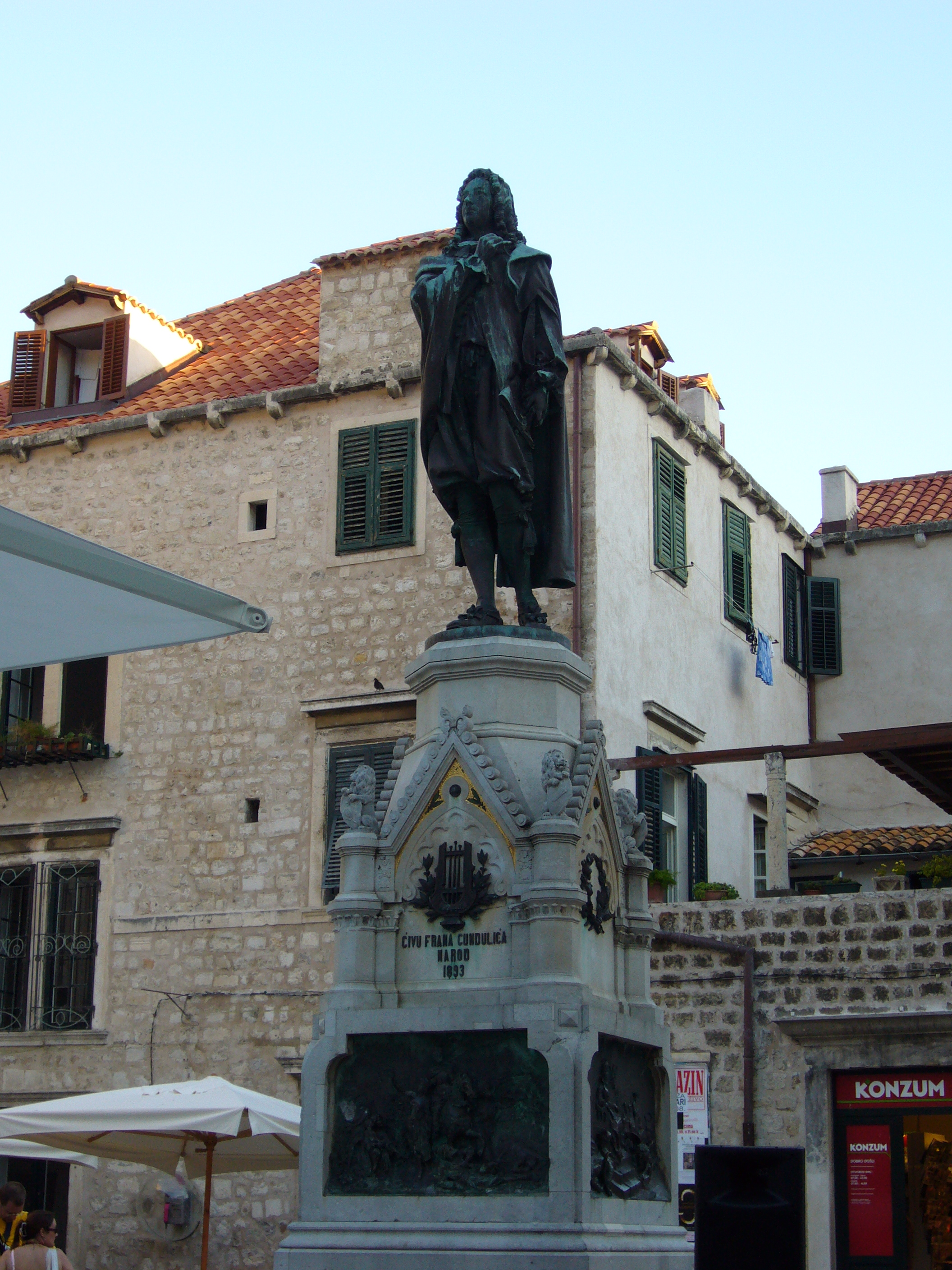 Statue Fran Gundulic / Fran Gundulić